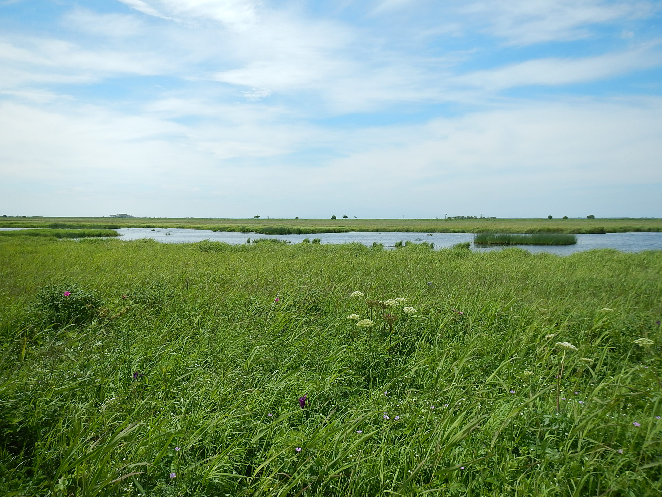 野付埼灯台近辺の竜神埼原生花園